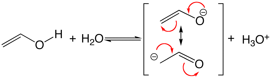 Equilibre acidobasique des énols, entre dans la mésomérie, notamment